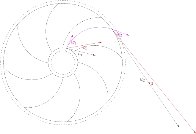 imagen creada con asymptote Esta imagen representa el triángulo de velocidades presente en una turbomáquina generadora radial, el fluido entra en el centro del rodete y sale por la periferia